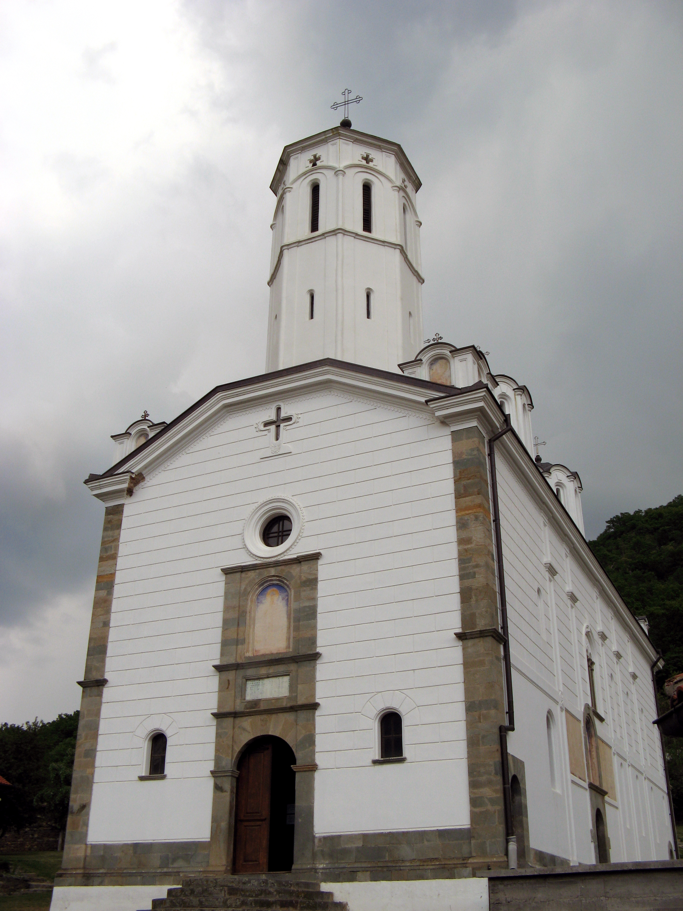 Manastir Sv. Prohor Pčinjski